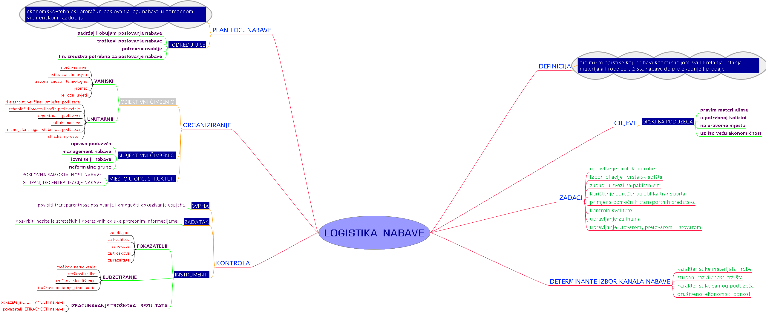 Mentalna mapa : Logistika nabave